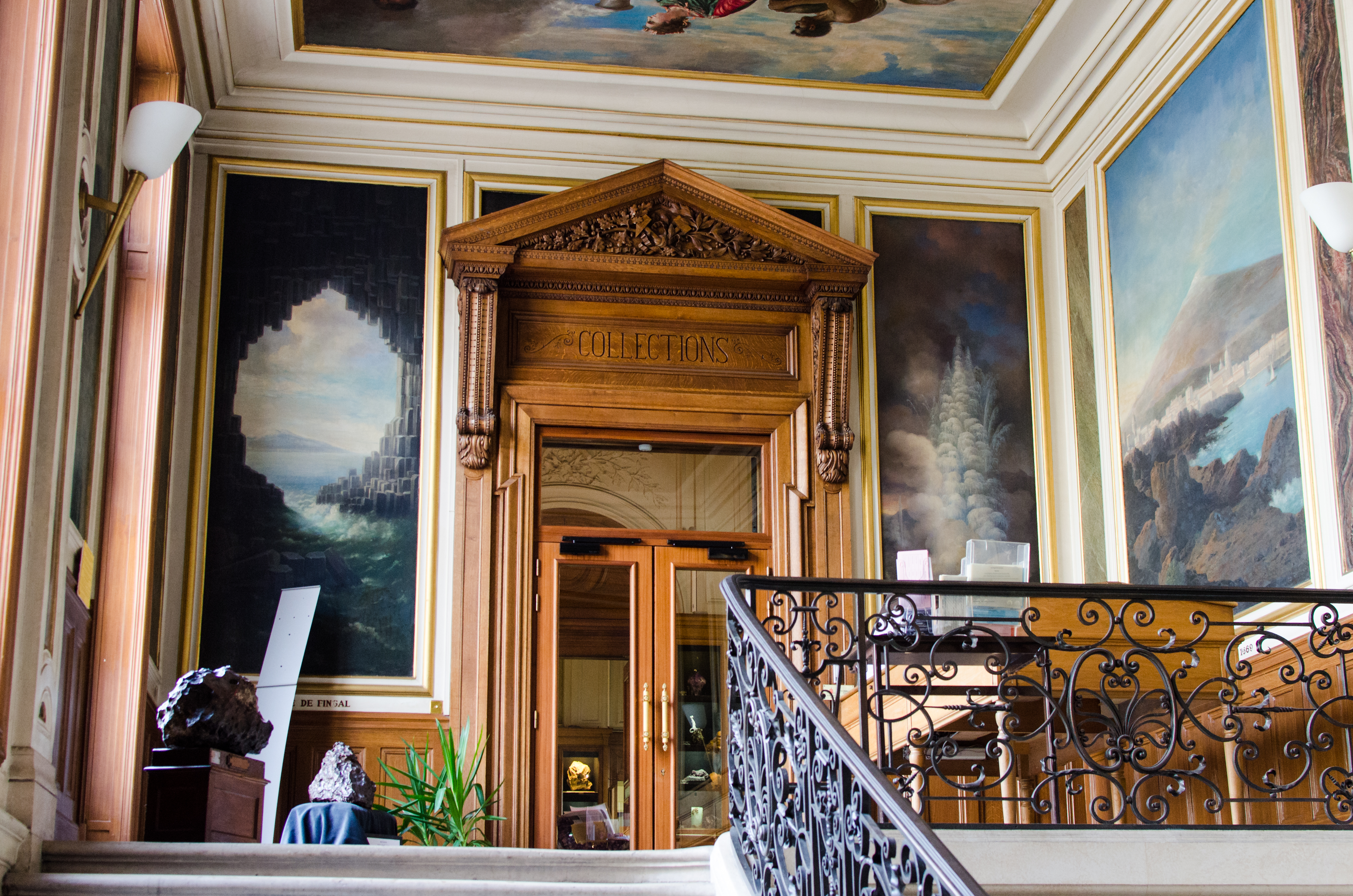 Entrée du musée de Minéralogie de Paris.